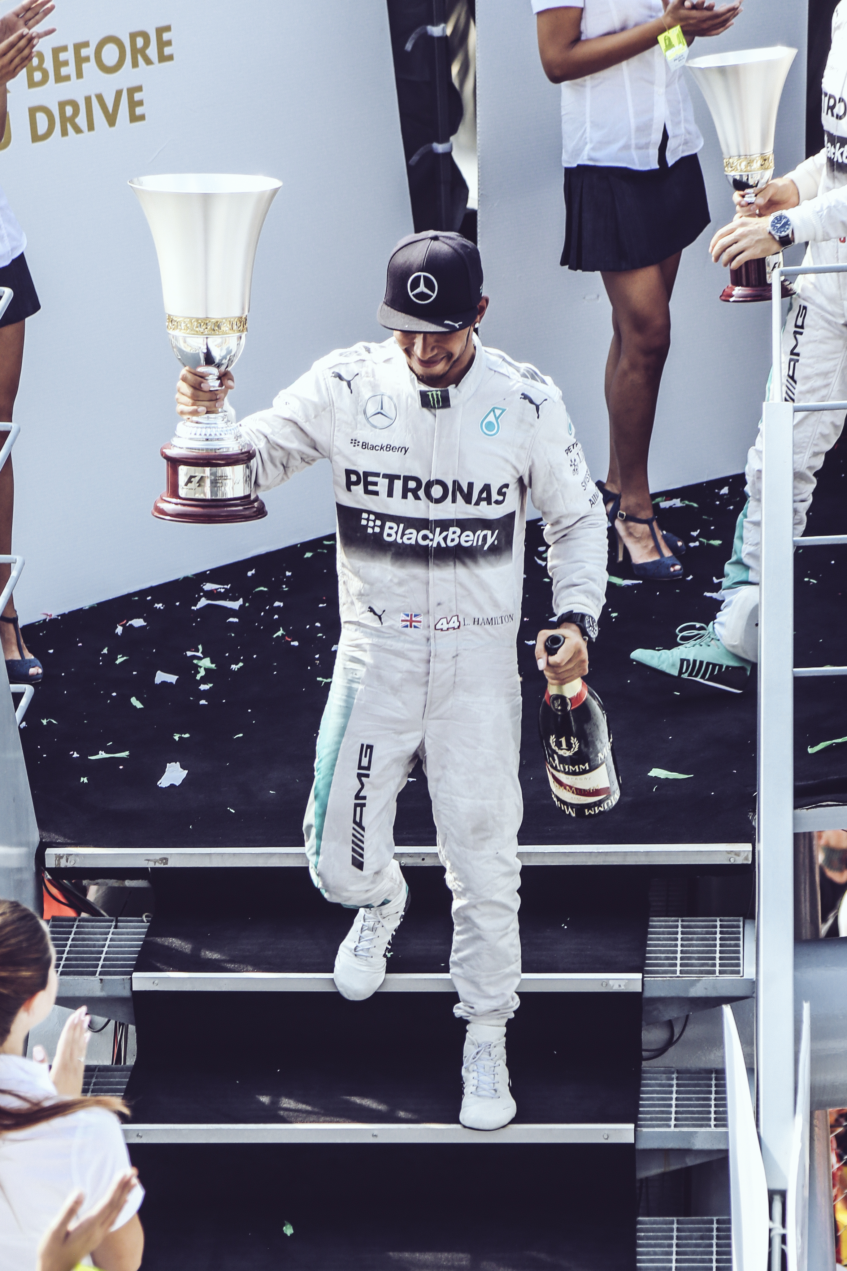 GP MONZA 2014